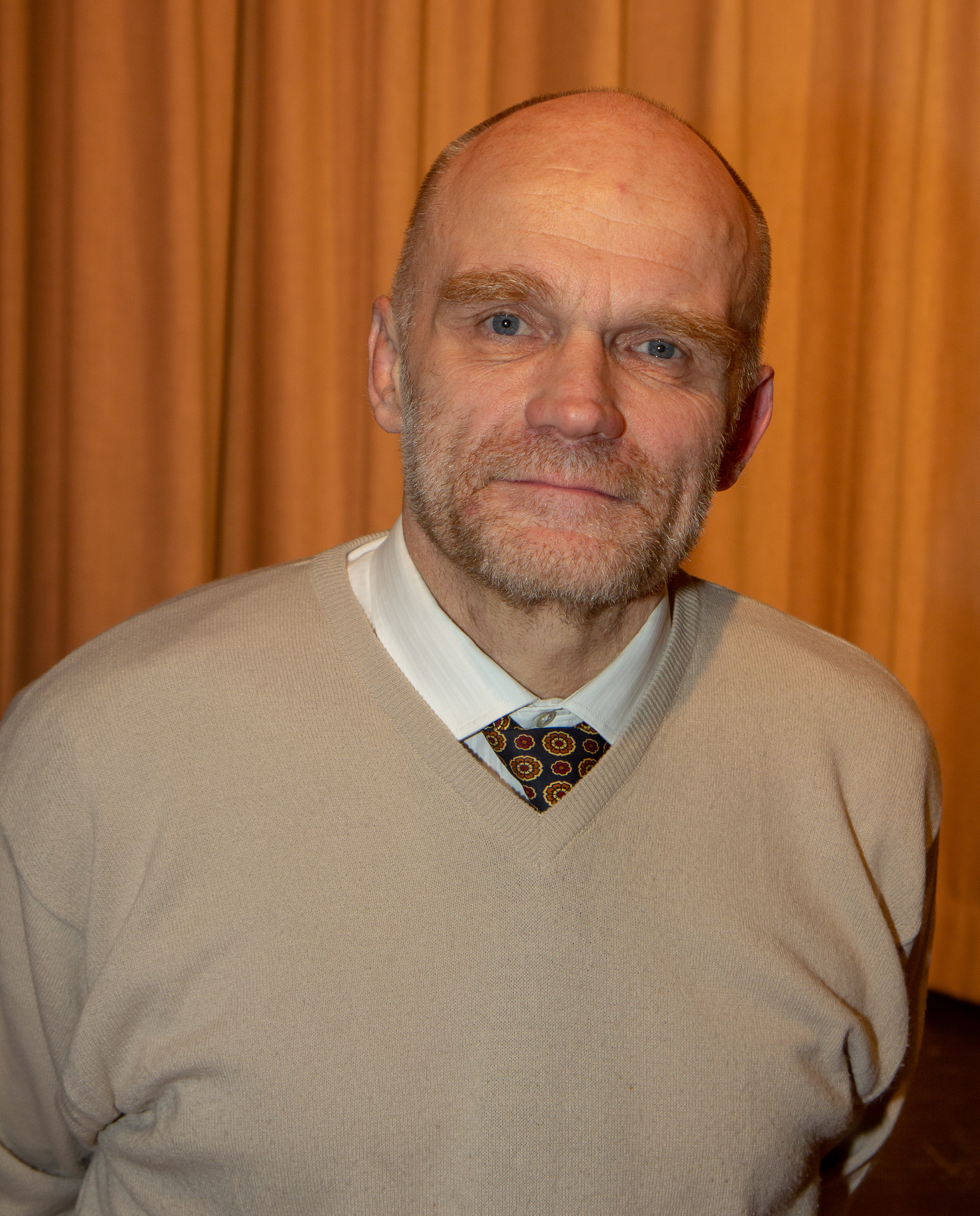 Frédéric Petit